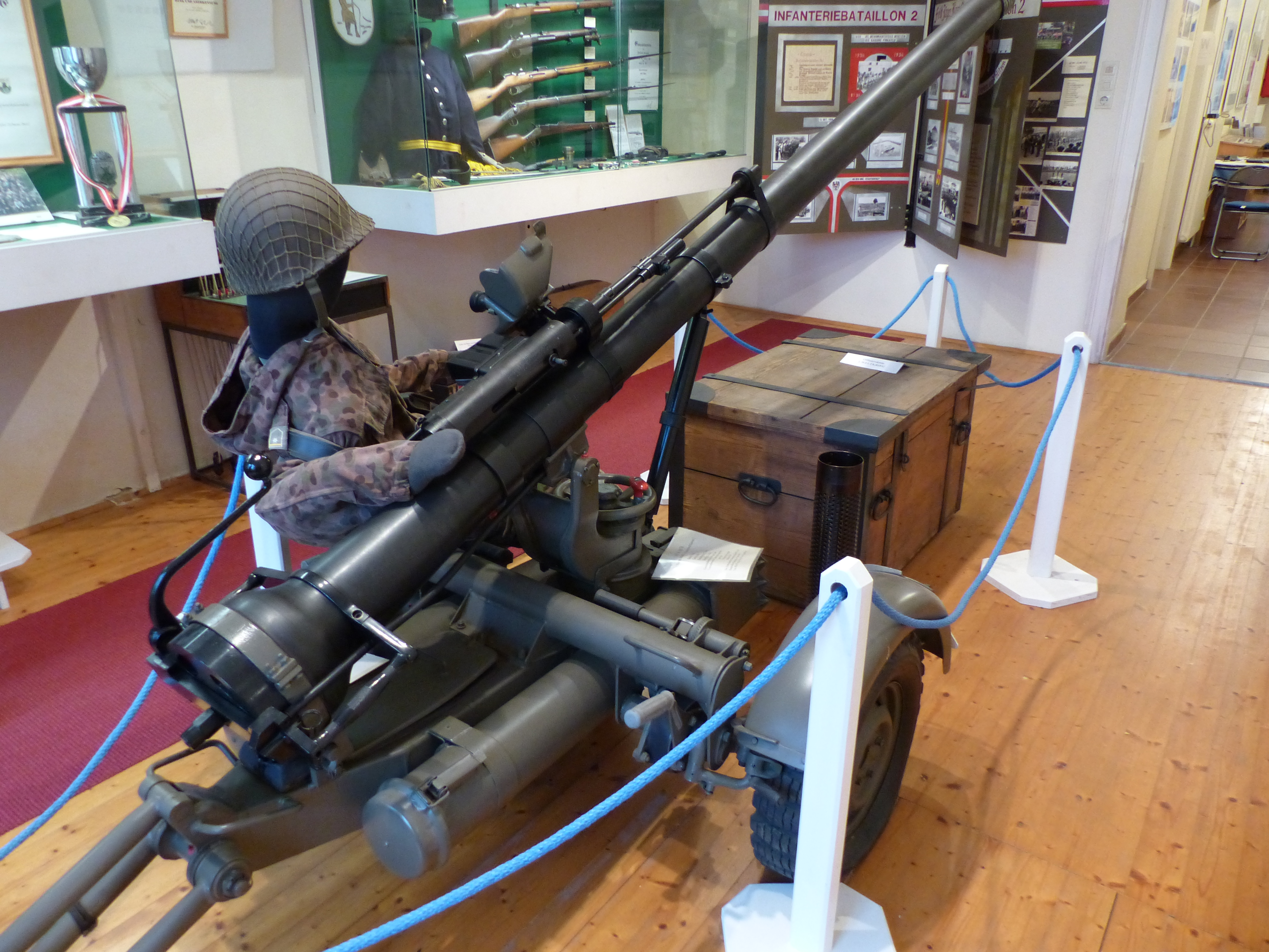 Rückstoßfreies Geschütz M40 (10,6cm rPak) im Stadtmuseum Pinkafeld